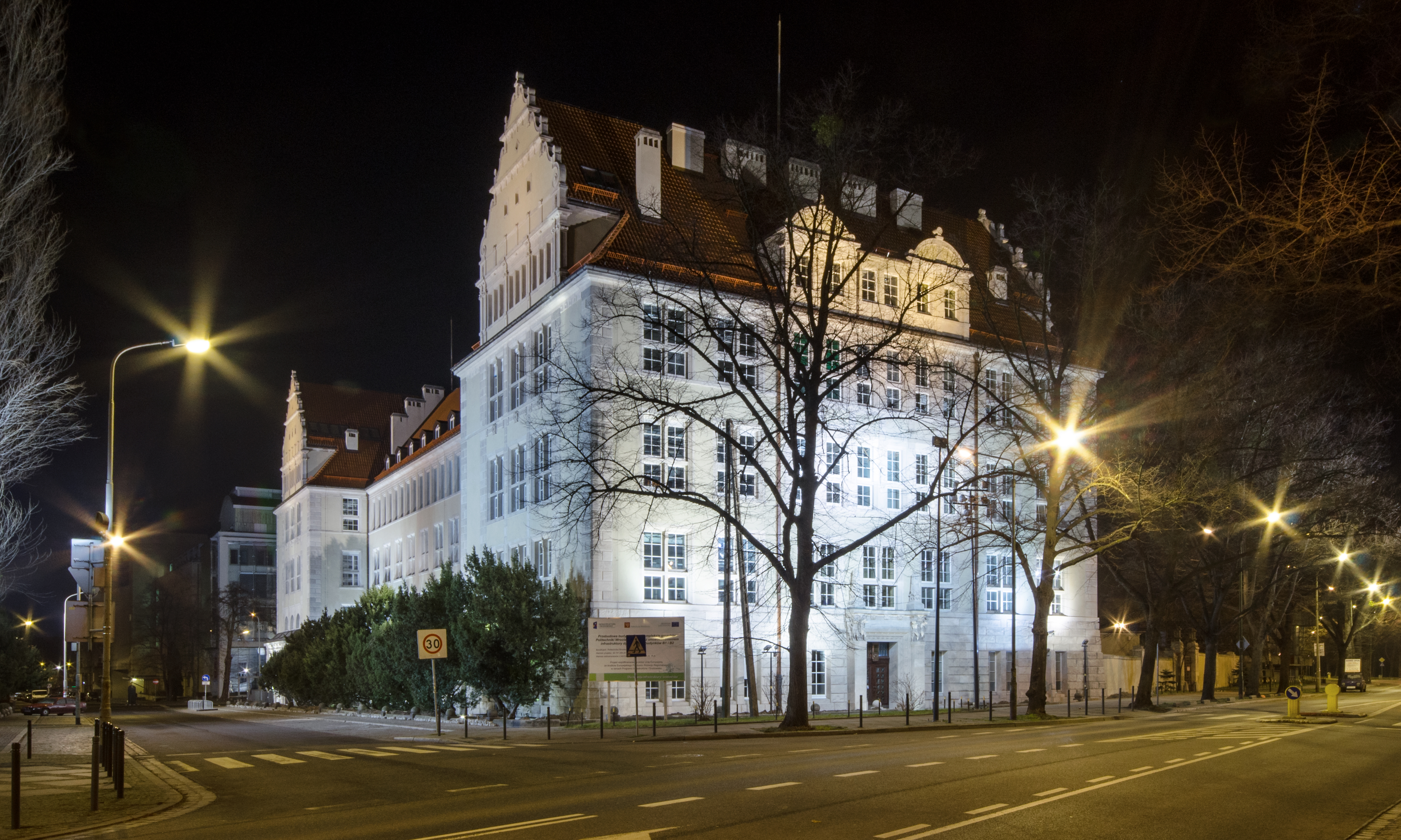 Wrocław, instytut Hutnictwa, 1905-1911, 1935 (Politechniki Wrocławskiej)